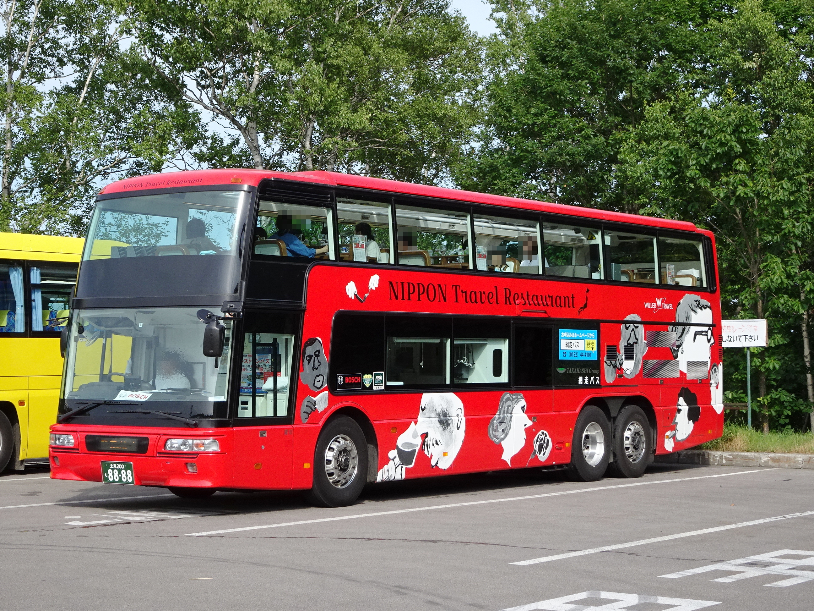 Restaurant Bus